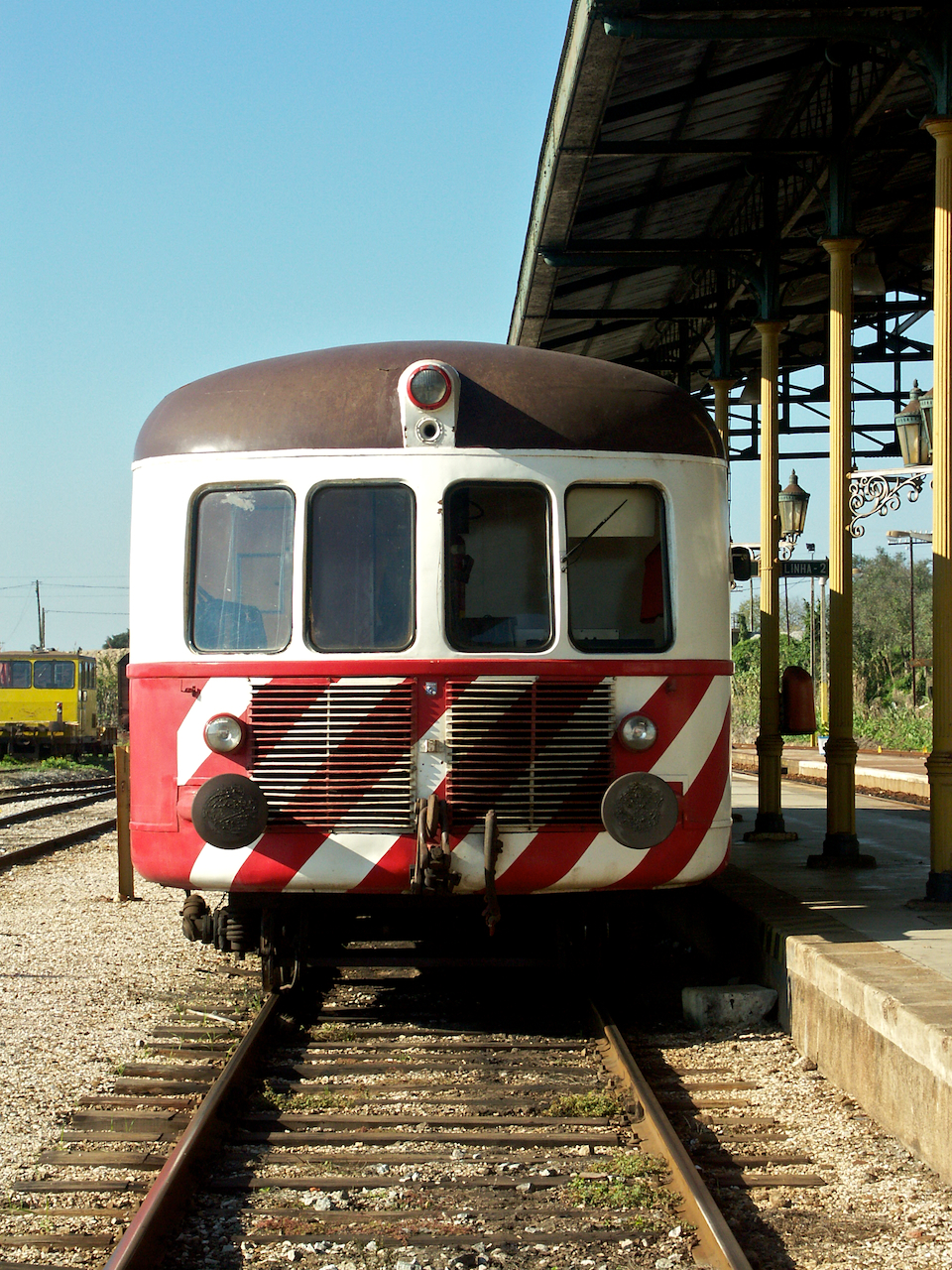 Tipo: Comboio Regional 6707 [Casa Branca - Évora] Local: Estação de Casa Branca [Linha do Alentejo, PK 90 • Linha de Évora, PK 90] Data e hora: 4 de Dezembro de 2004 [12h46] Material: Automotora 0113 [Unidade Simples Diesel - Nohab] vídeo desta viagem aqui.